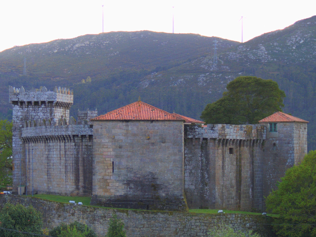 Castelo de Vimianzo - Vimianzo - A Coruña